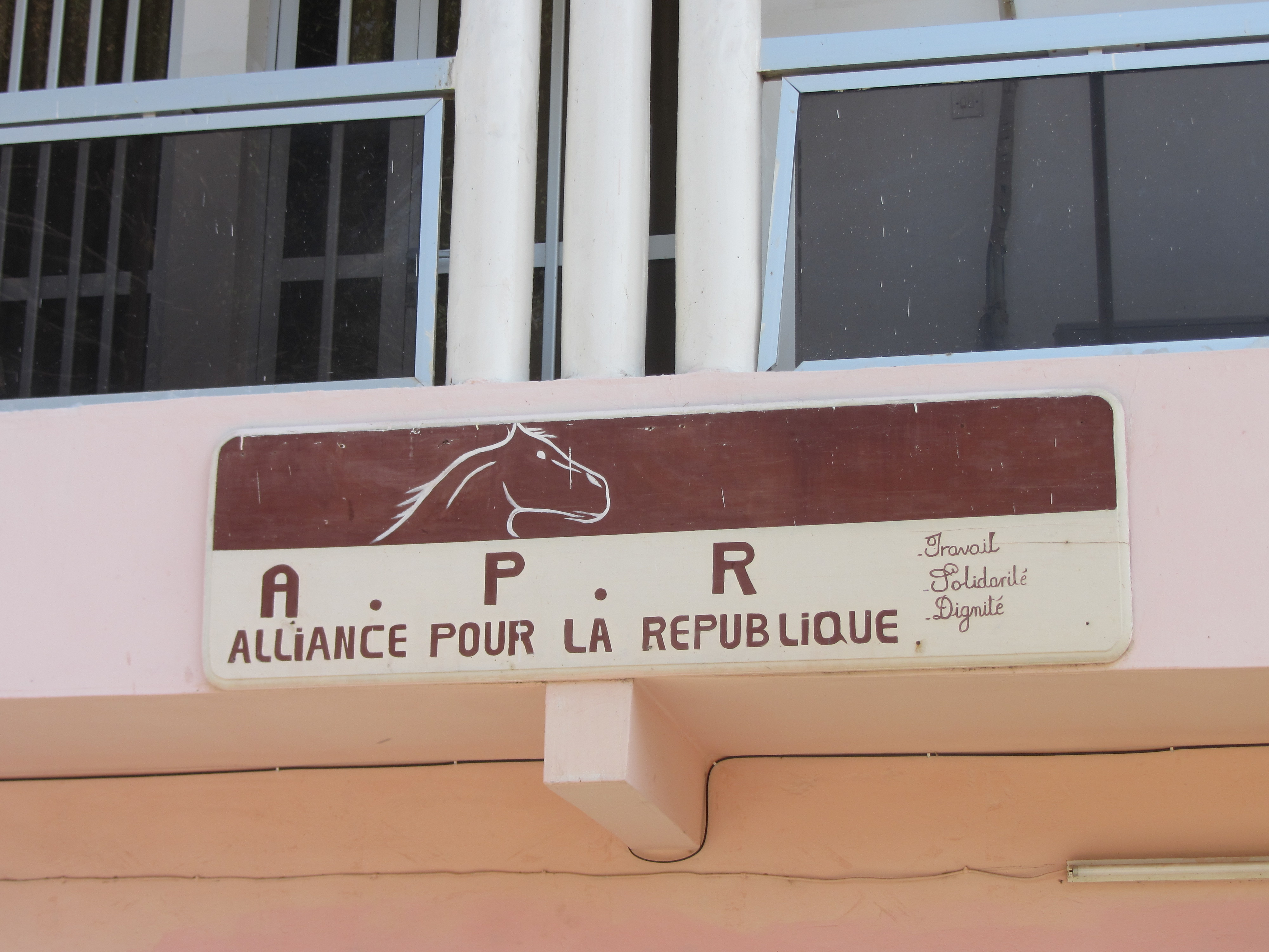 This document was produced using the Canon PowerShot SX230 HS lent by Wikimedia France.